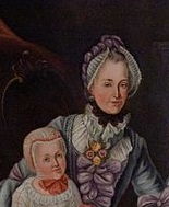 1771-peinture de Anna Eleonore Charlotte Friederike, geb. von Posadowsky Freiin von Postelwitz 1735 1813 fait au château de Gross Wilkau en silésie Elle est la soeur de Karoline katharine luise Henriette von Posadowsky (1738-1824) épouse de karl Wilhelm von Tschirschky